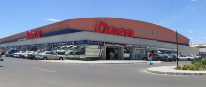 obras